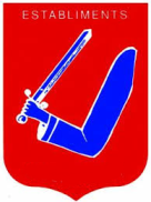 Escudo de Establiments